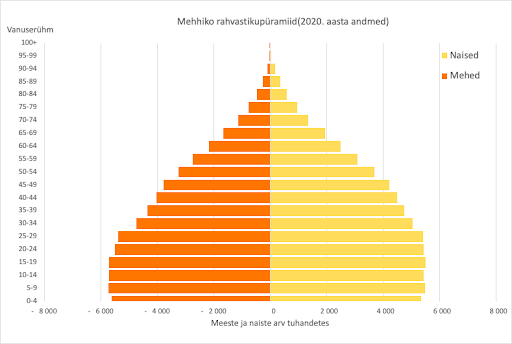 Mehhiko rahvastikupüramiidilt on näha, et see on 3. etapis (Demograafilise arengu II etapp). Mehhiko rahvaarv tõuseb endiselt ja iive on positiivne, kuid laste osakaal on langemas ning sündimus väheneb, kuid on ikkagi kõrge. Keskmine eluiga on tõusu teel ja eakate osakaal tõuseb.